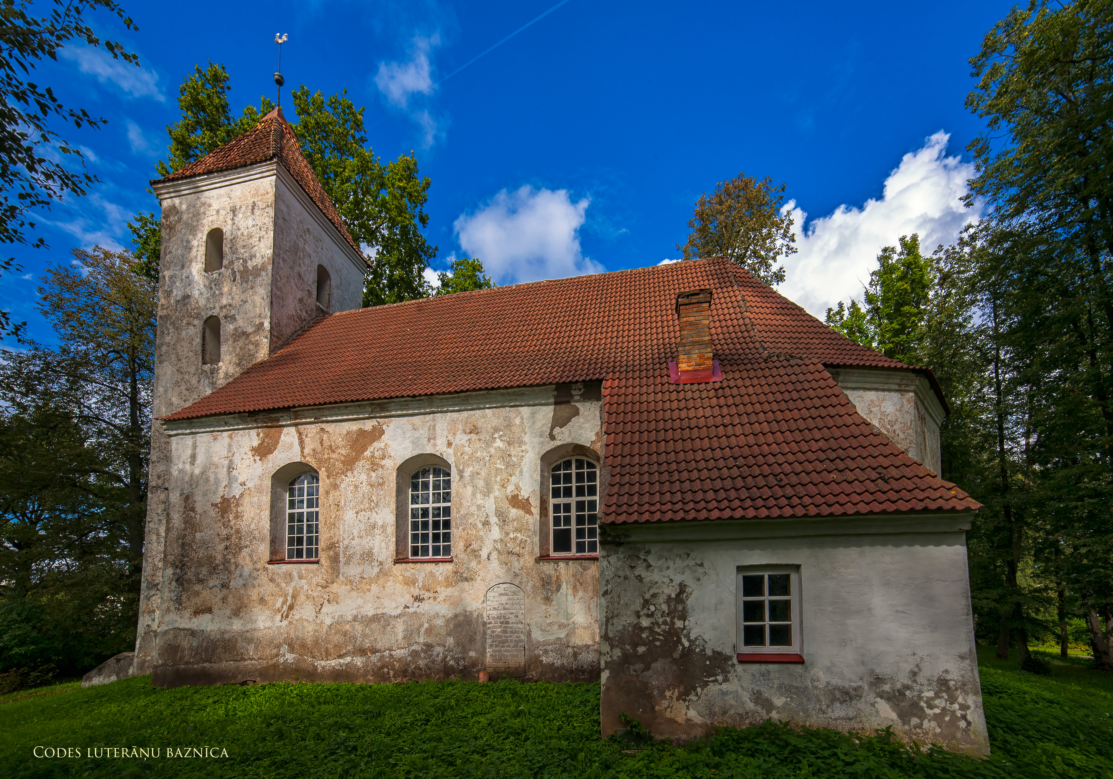 Codes luterāņu baznīca, Code